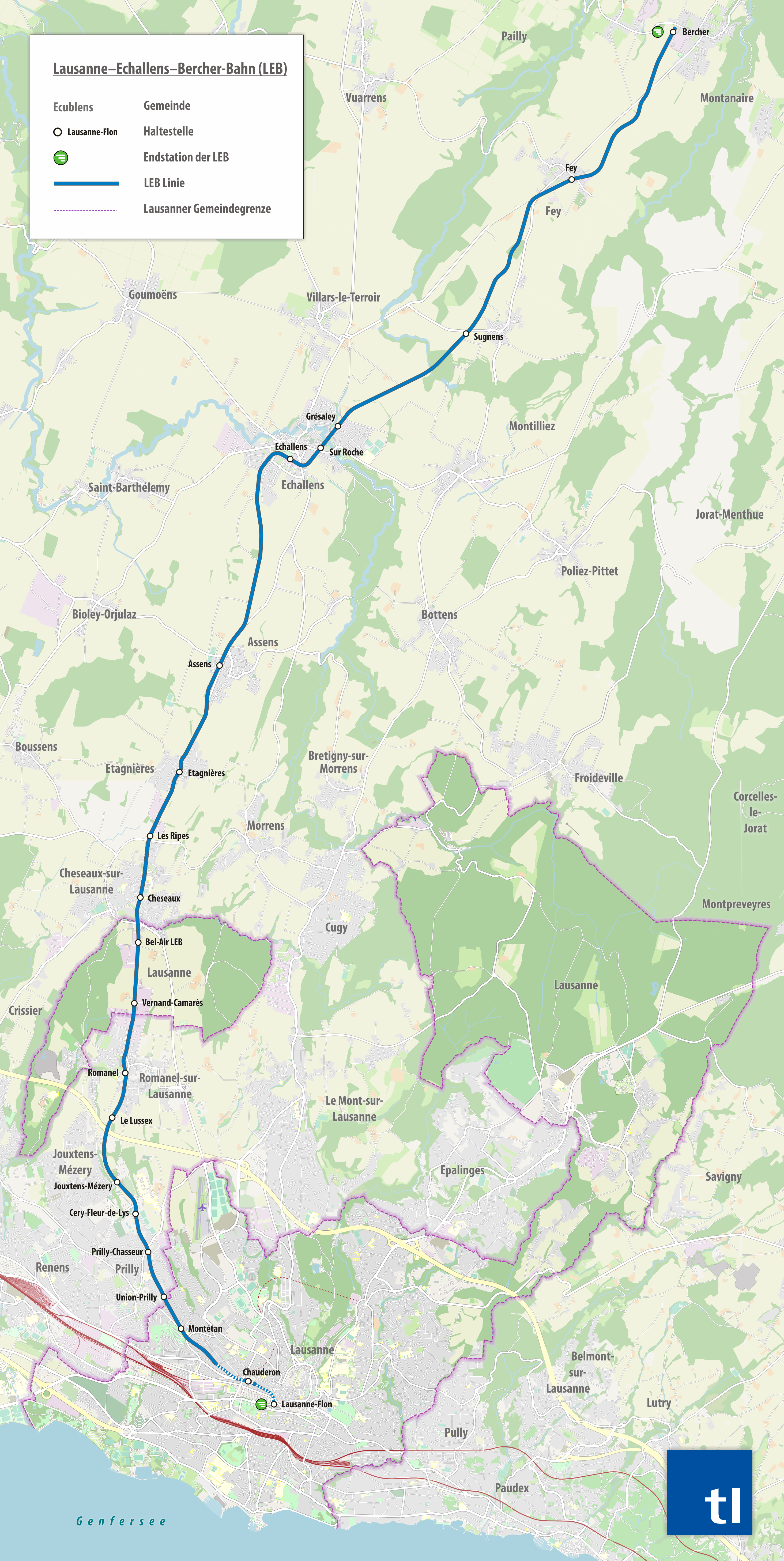 Railway Lausanne-Échallens-Bercher (LEB)